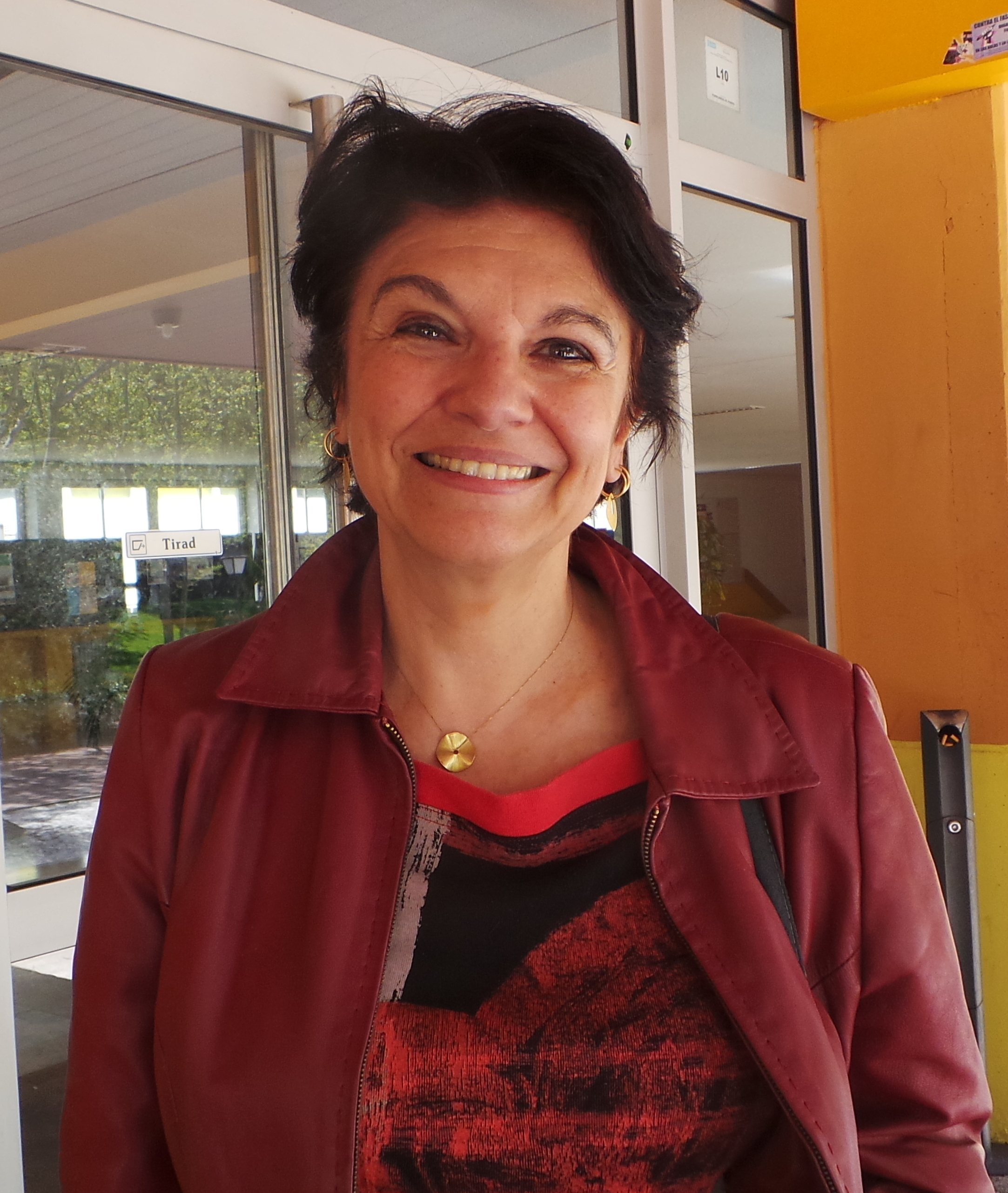 Soledad Murillo en la Universidad Autónoma de Madrid